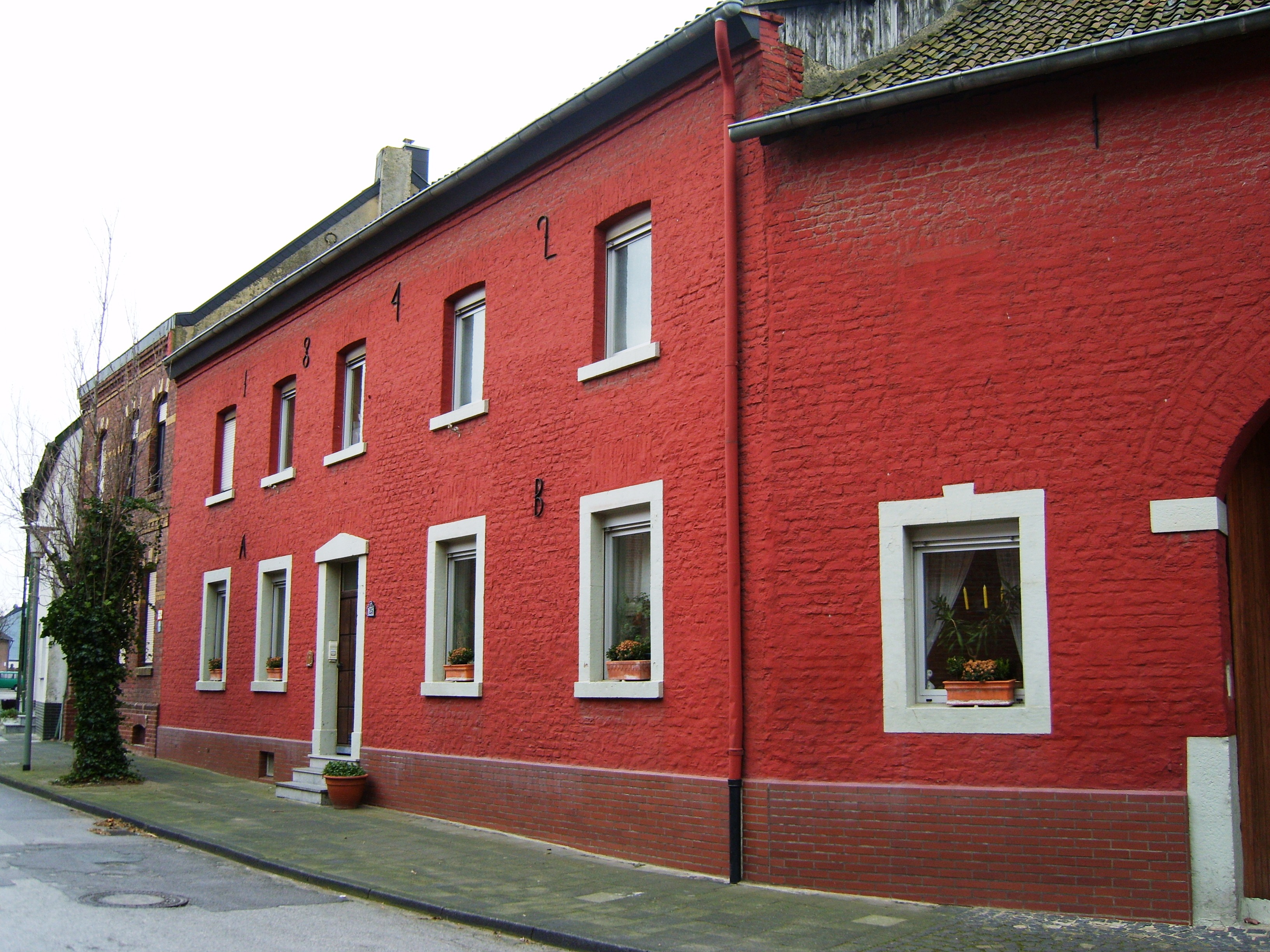 Ein roter Hof aus dem Jahre 1842 in Fronhoven bei Eschweiler in der Städteregion Aachen